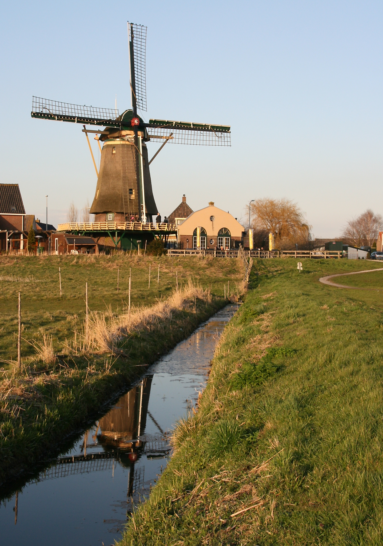 Nootdorp: molen "Windlust", gezien vanaf de kant van de Dobbeplas